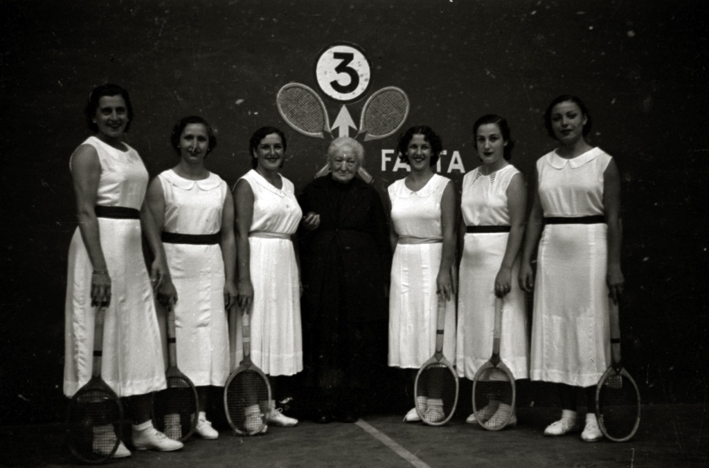 Título original: Grupo de raquetistas posando en un frontón (5/5) Localización: San Sebastián (Guipúzcoa)